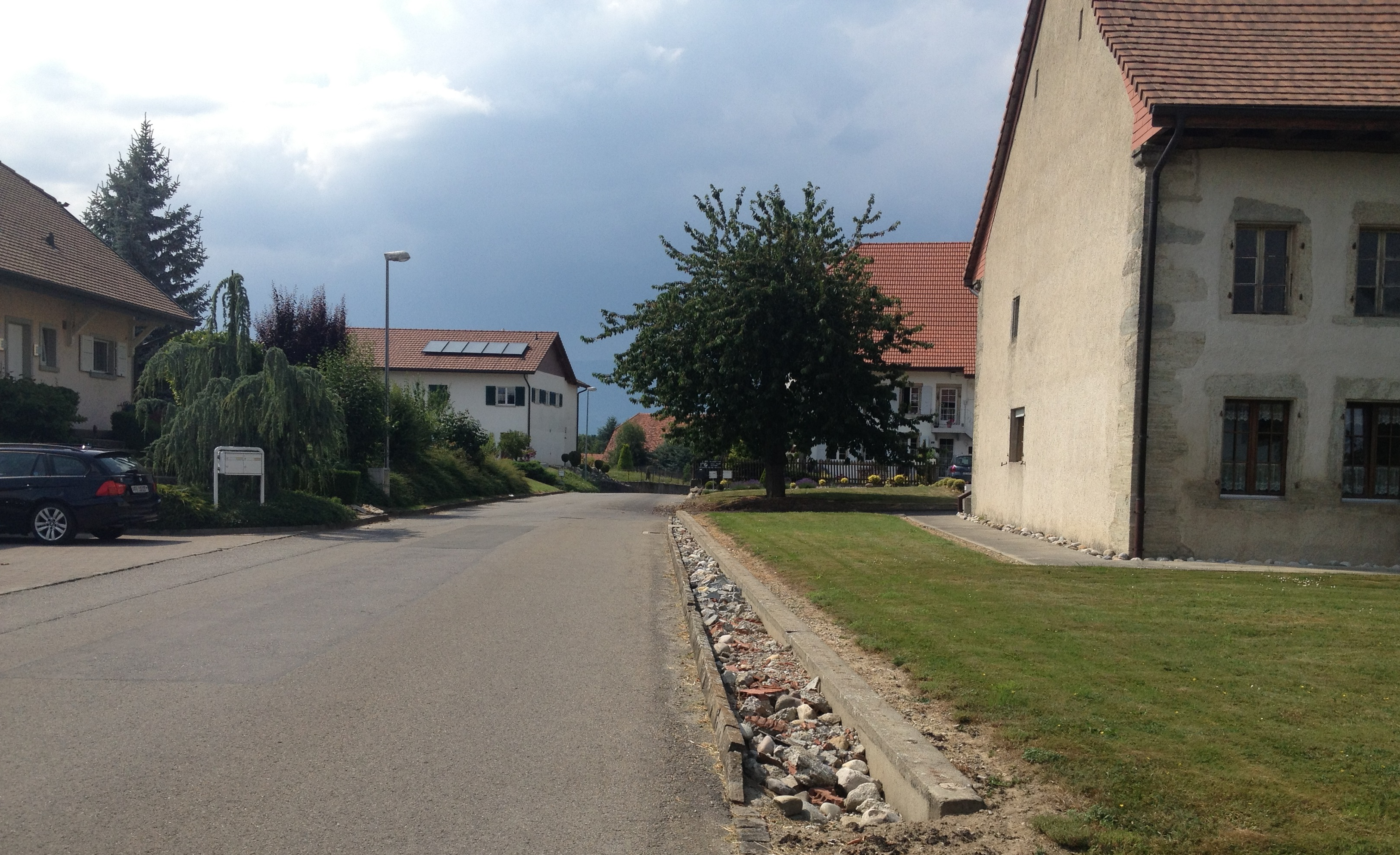 Le village d'Autavaux dans la commune fribourgeoise de Vernay en Suisse.